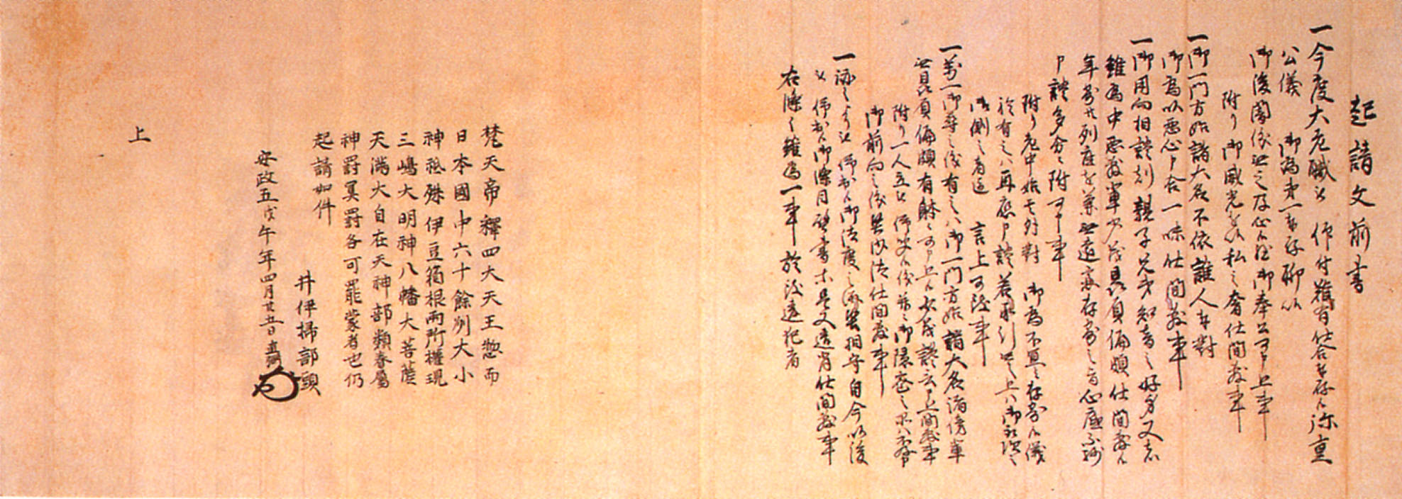 文書「井伊直弼大老職就任誓詞控」井伊直弼が大老職就任にあたり自身で書いた誓詞の控え。